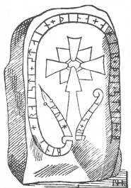 U732, runsten